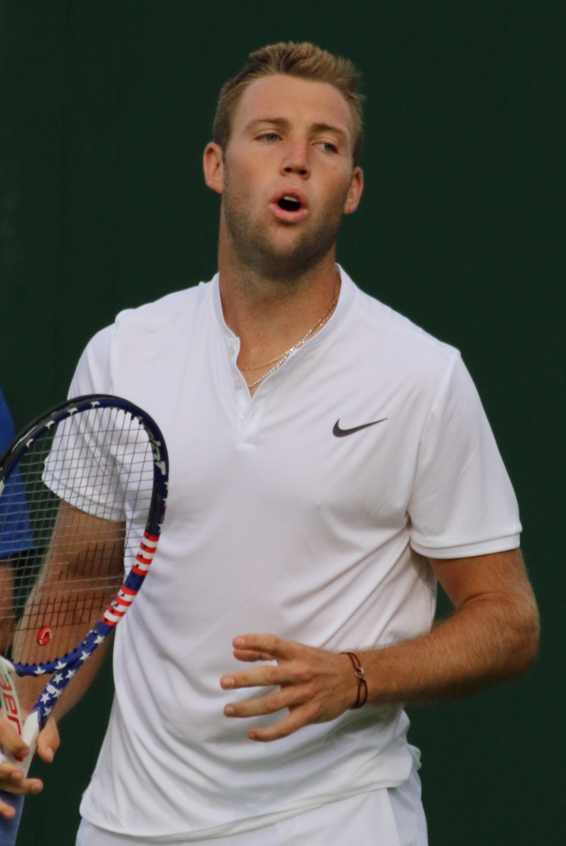 Sock WM16 (1)